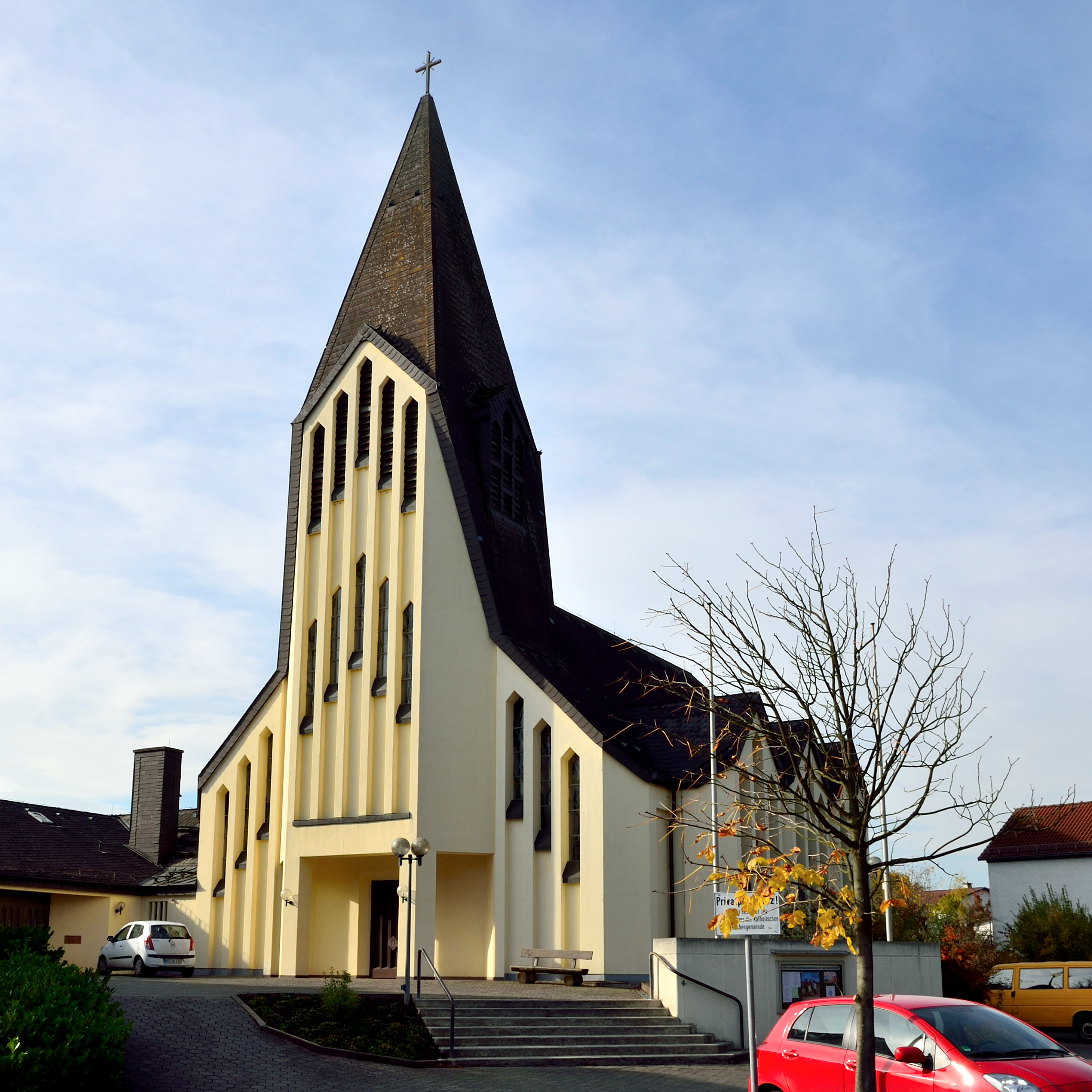 Die kath. Bonifatiuskirche in der Frankenberger Straße in Wetter (Hessen)